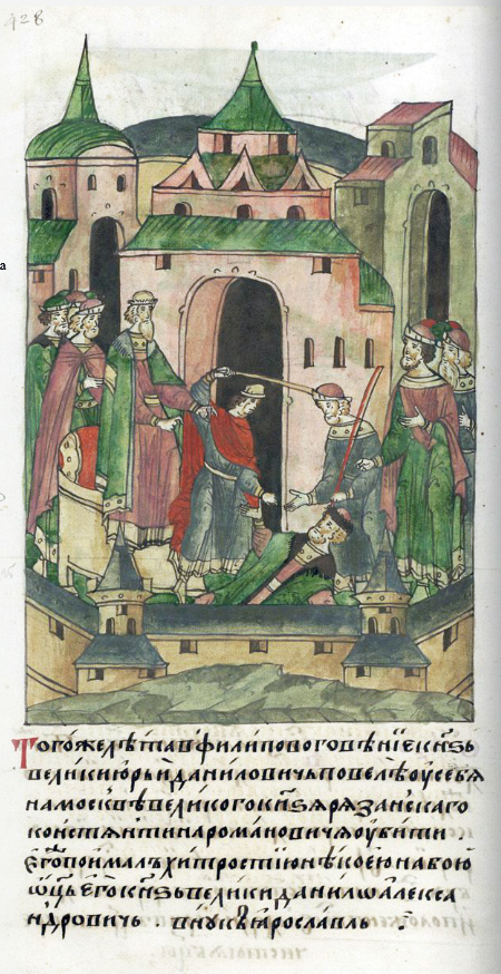 ЛИЦЕВОЙ ЛЕТОПИСНЫЙ СВОД В том же году в Филиппово говение князь великий Юрий Данилович повелел у себя на Москве великого князя рязанского Константина Романовича убить, которого захватил хитростью некоею на бою отец его, князь великий Данило Александрович, внук Ярославлов.